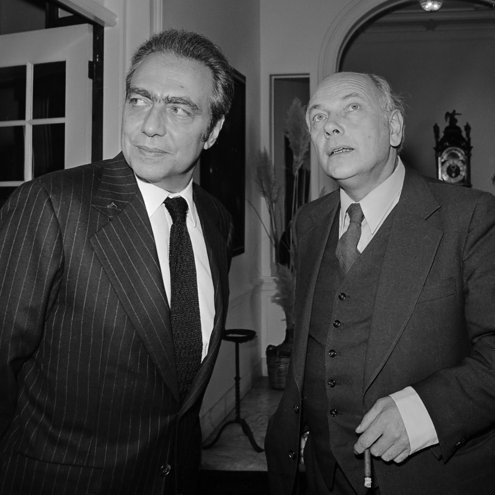 Premier Den Uyl ontvangt de voorzitter Europese Commissi Francois Xavier Ortoli (links) op Catshuis 22 oktober 1973